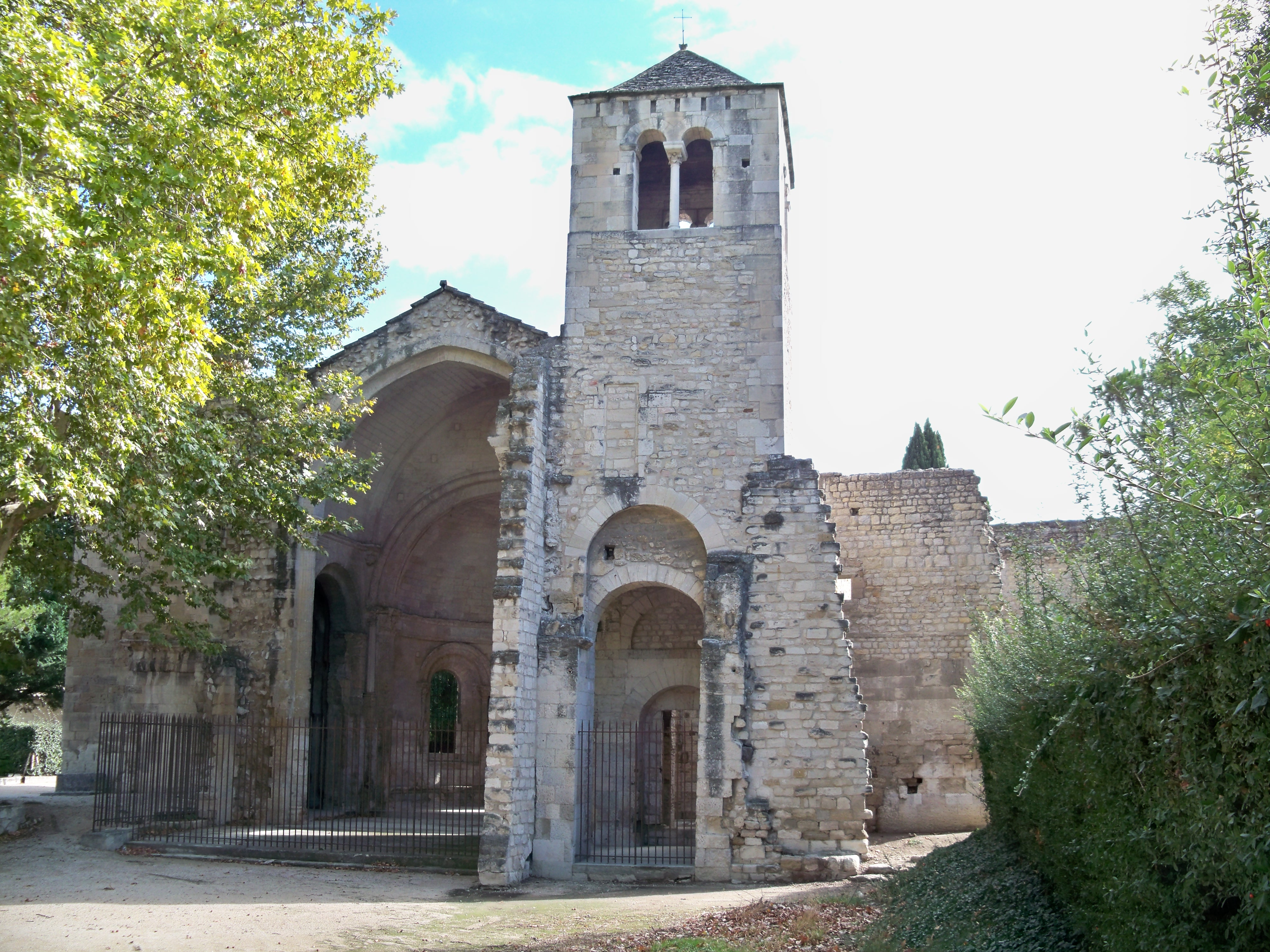 Abbaye de Saint Ruf à Avignon : vue générale .